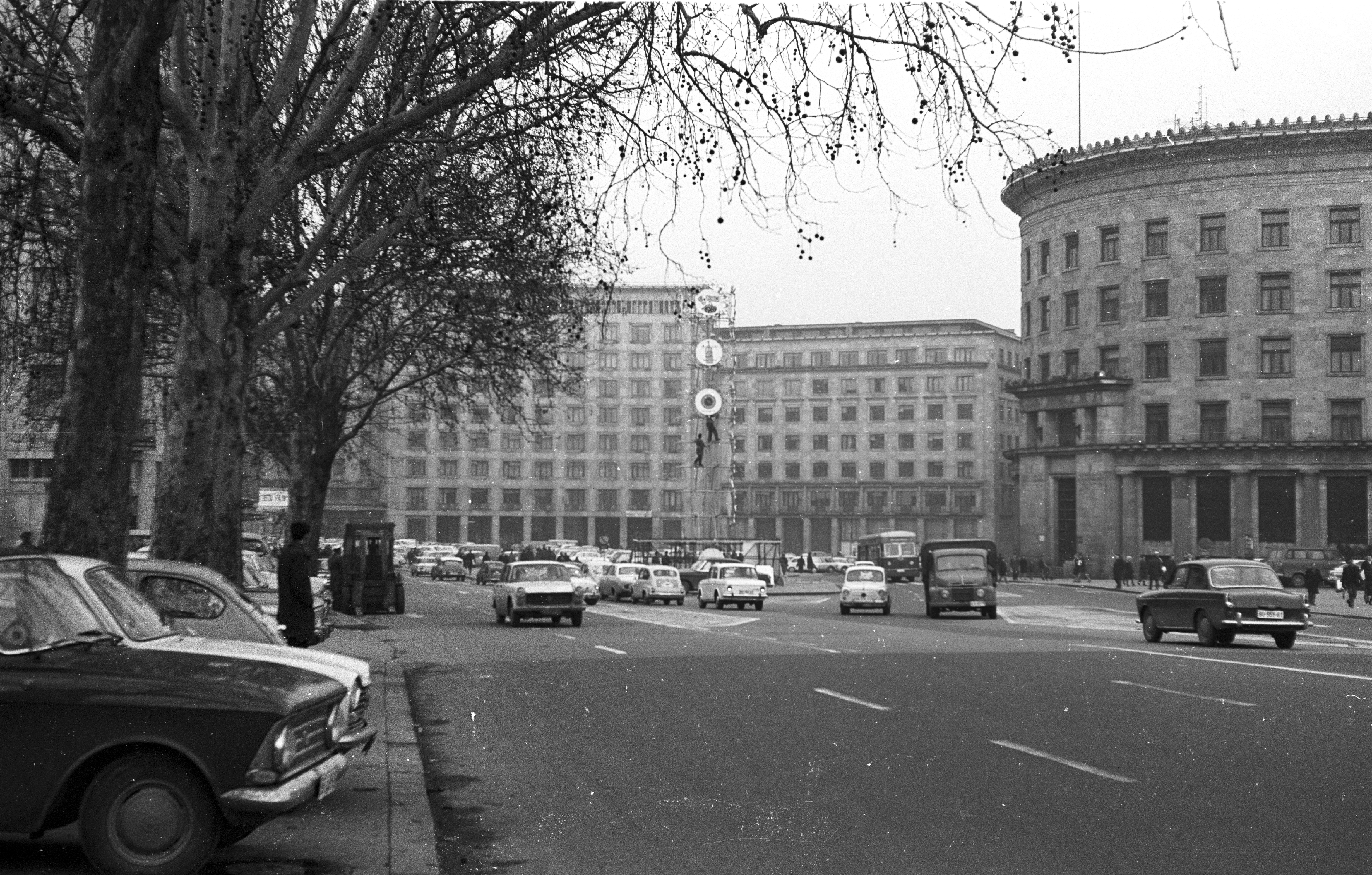 Nikola Pašić (Marks i Engels) tér, szemben a Jugoszláv Szakszervezeti Székház (Dom sindikata Jugoslavije). Location: Serbia, Belgrade Tags: Yugoslavia, street view, genre painting, automobile, commercial vehicle Title: Nikola Pašić (Marks i Engels) tér, szemben a Jugoszláv Szakszervezeti Székház (Dom sindikata Jugoslavije).